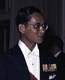 Empfang für das thailändische Königspaar auf dem Petersberg